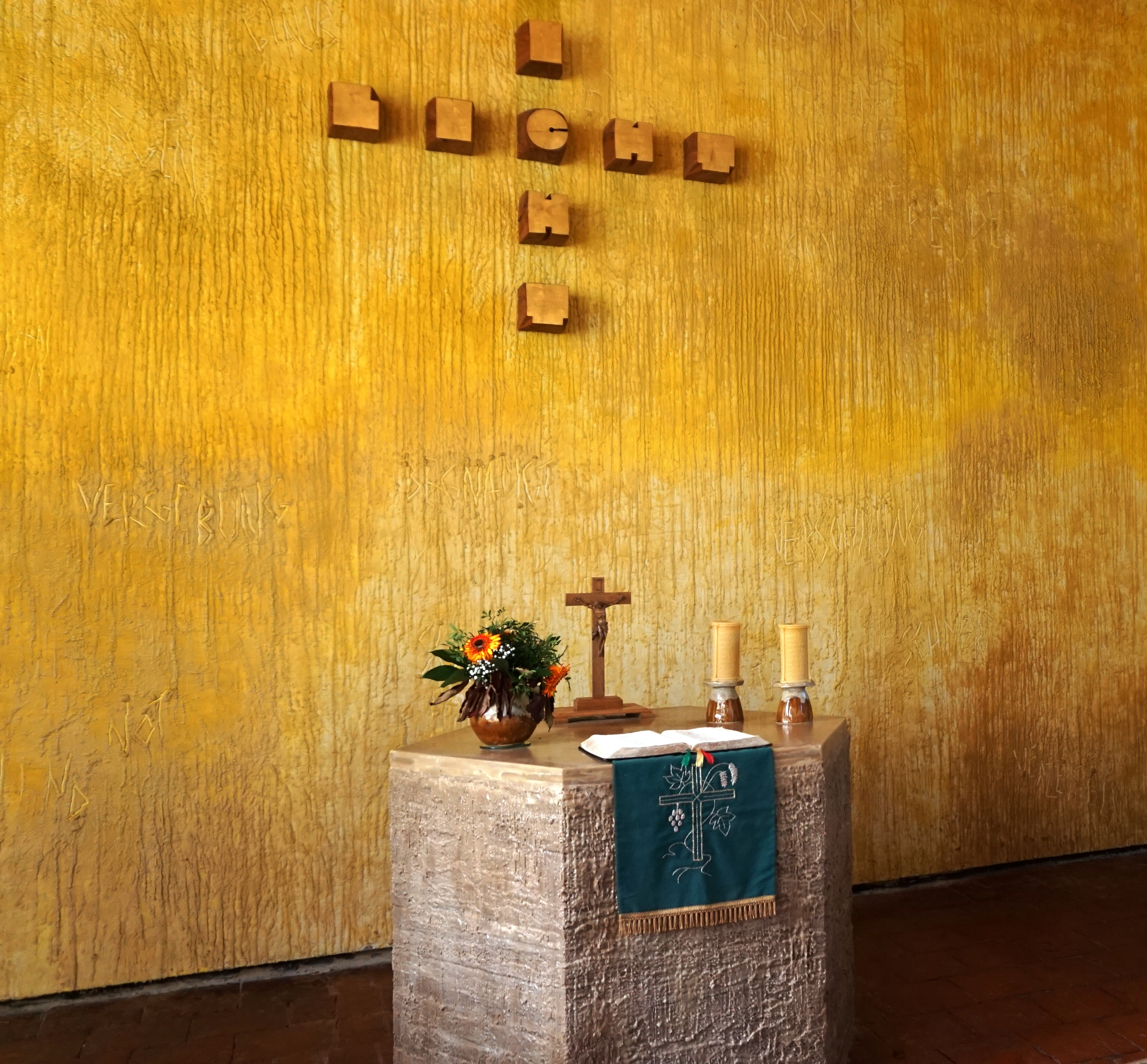 Der Altar und die Rückwand der Hoffnungskirche sind aus 1000 Kilogram Bienenwachs gestaltet worden. Ein Kustprojekt der Berliner Künstlerin Brigitte Trennhaus.